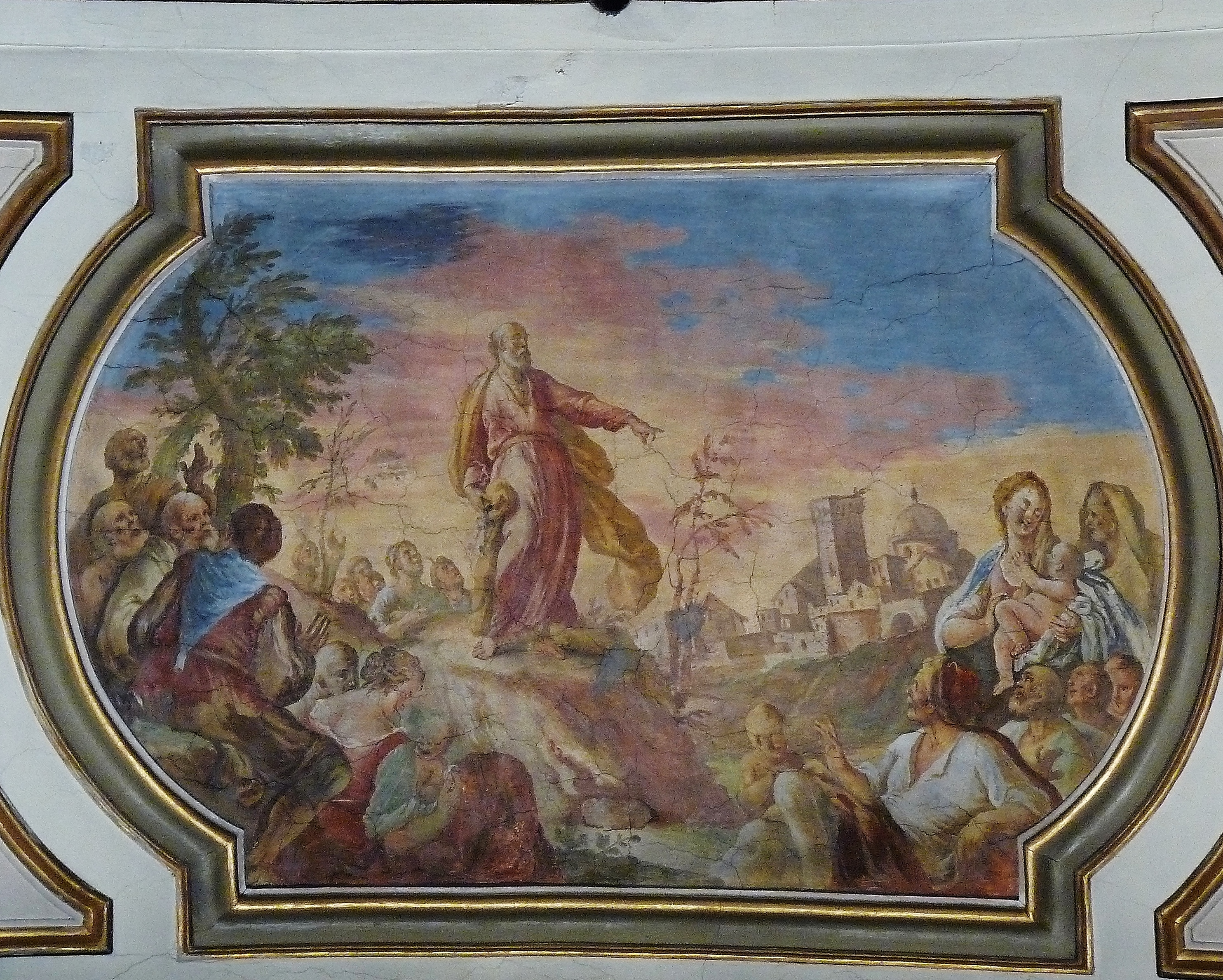 Affresco di Domenico Carella raffigurante una scena biblica con veduta prospettica di Ceglie Messapica alla fine ‘700